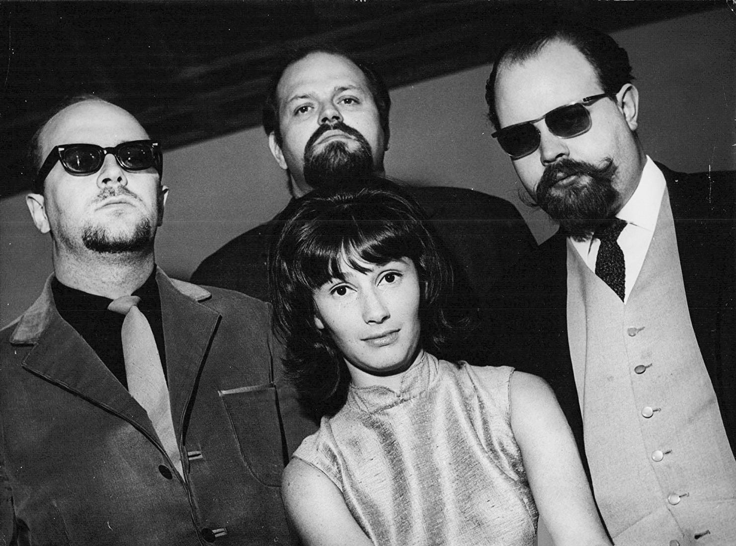 Tre med skägg och en utan. De vid det här laget riksbekanta "skäggen" skall i sommar roa stockholmarna på Tivoliteatern som döpts om till "Narren". Här synes Monica Nielsen omgiven av de skäggiga herrarna – Lars O'Månsson, Beppe Wolgers och Åke Söderqvist – på Gröna Lund.